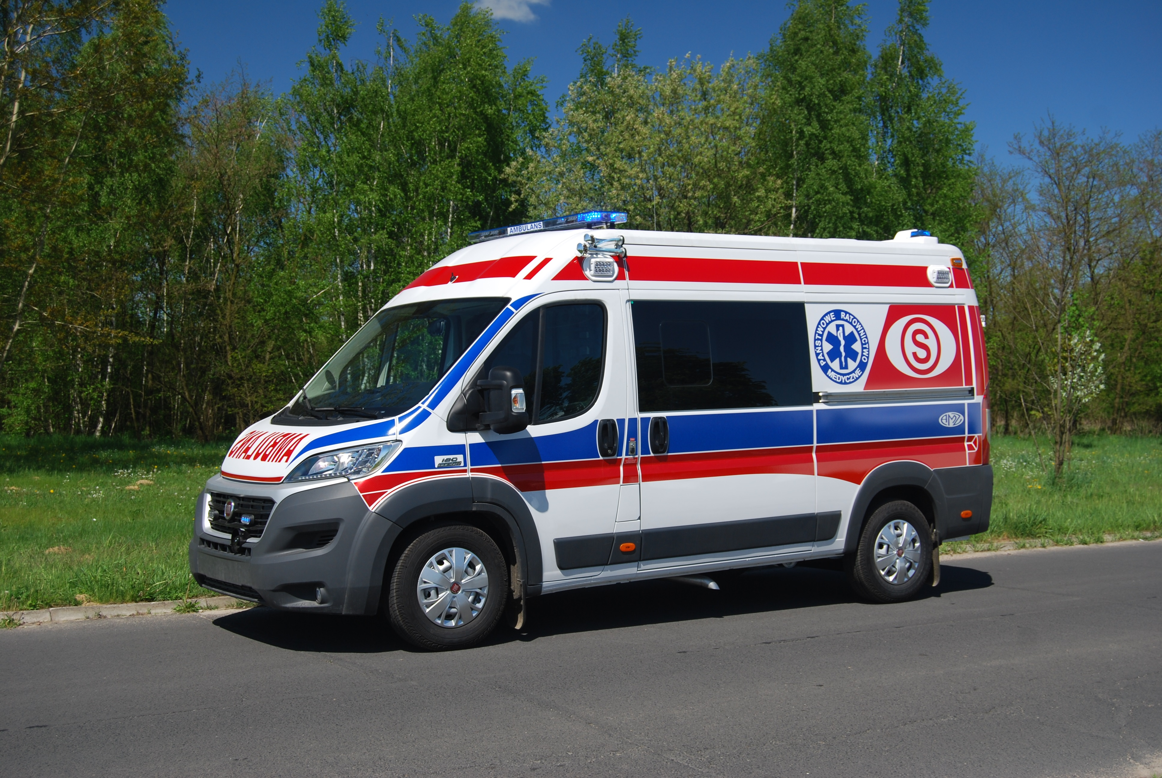 Ambulans na bazie Fiata Ducato przygotowany przez AMZ Kutno